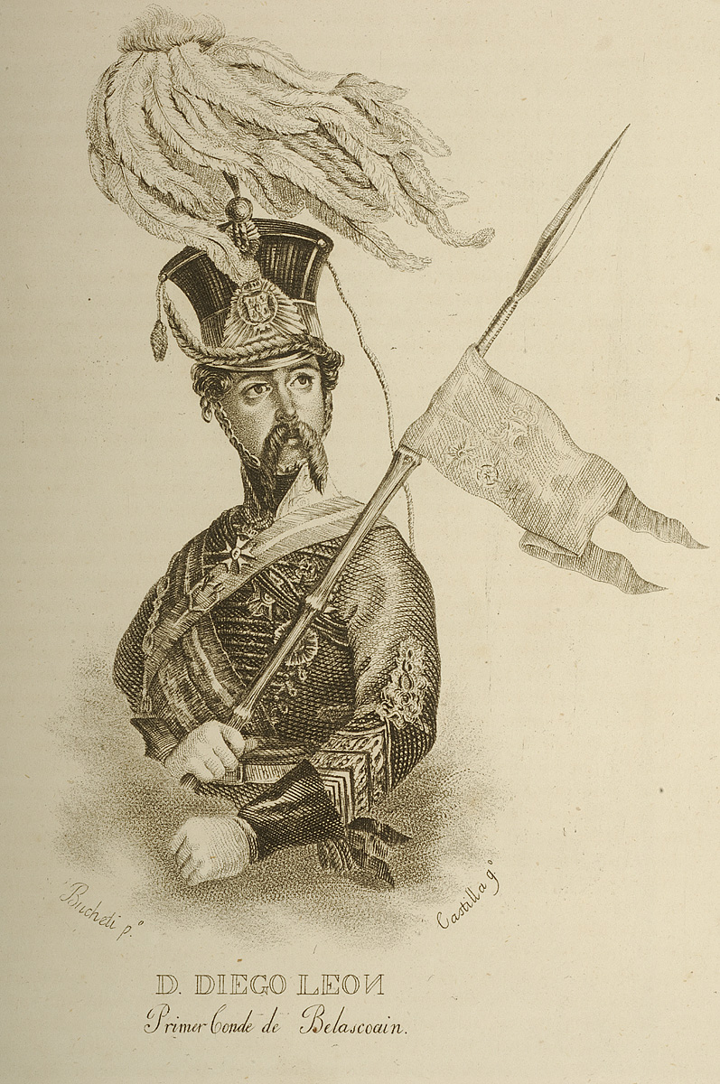 Grabado que representa al teniente general Diego de León, conde de Belascoain (1807-1841). Destacó por su valor en la Primera Guerra Carlista y fue fusilado en 1841 por haber asaltado el Palacio Real de Madrid e intentar secuestrar a la reina Isabel II de España.